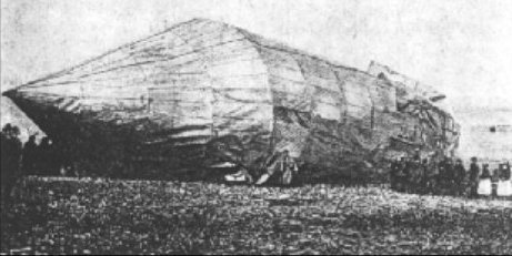 A szakszerűtlen leszállás közben megsérült léghajó Berlinben